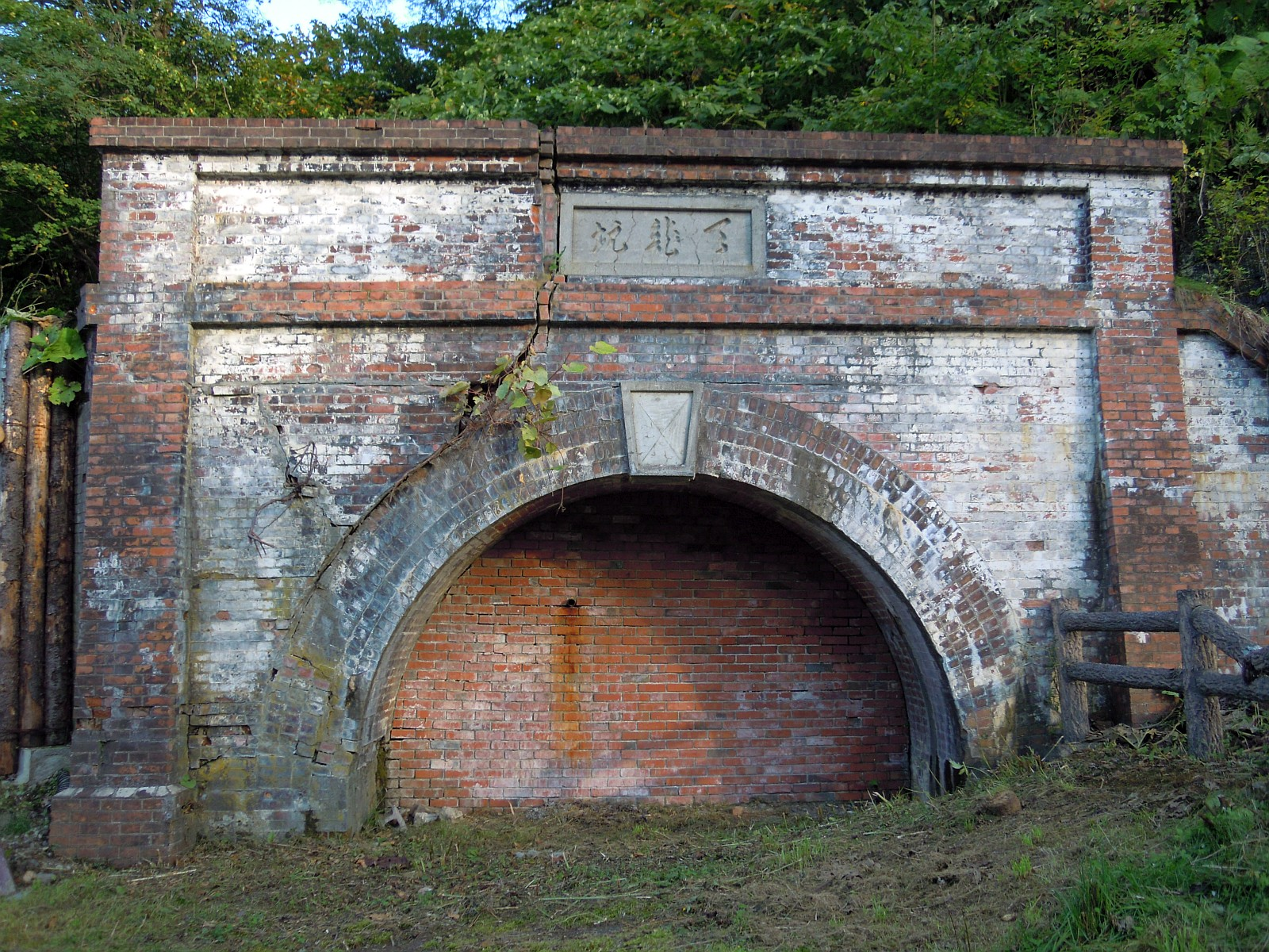 北海道夕張市の夕張市石炭博物館敷地内にある旧北炭夕張炭鉱天竜坑坑口跡